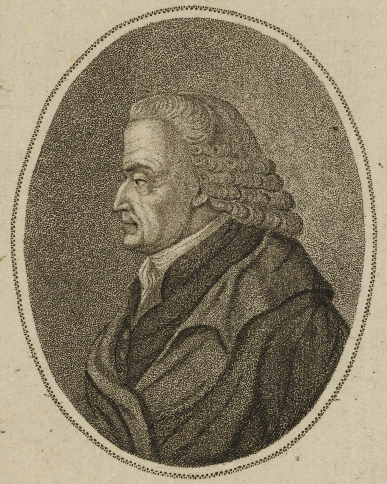 Portrait Johann Caspar Arletius (1707–1784)